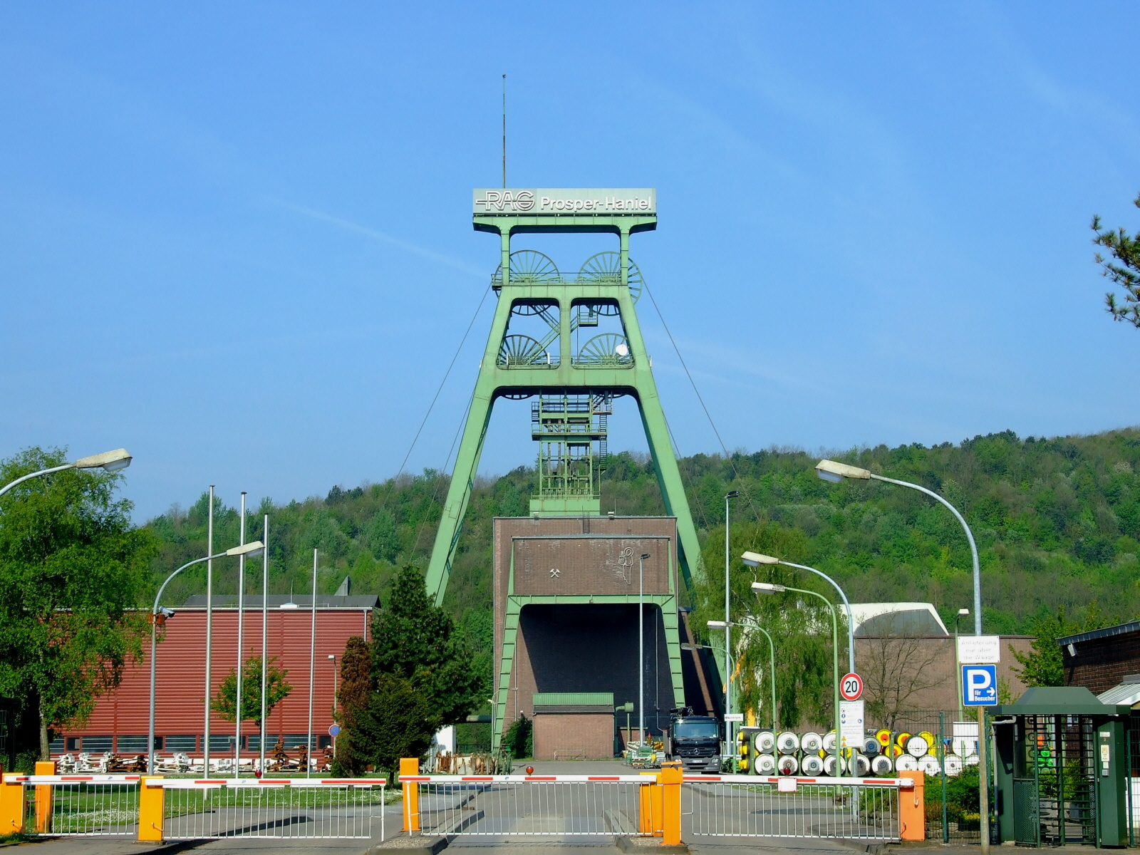 Schachtanlage Franz Haniel 1/2